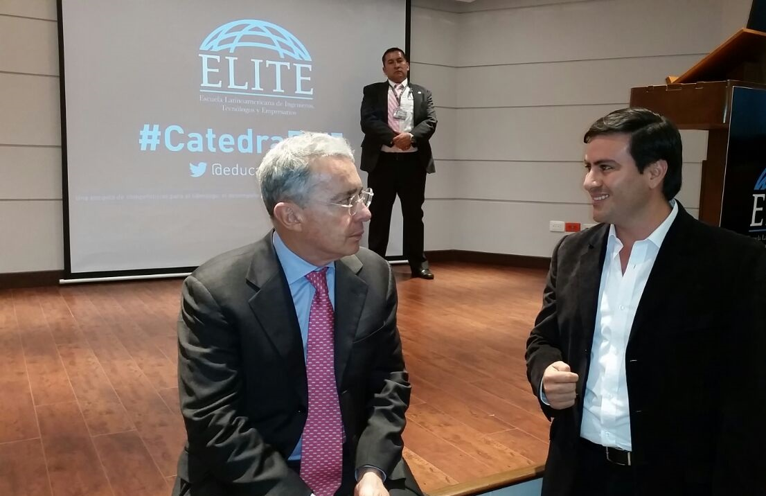 EmmanuelArango y Uribe